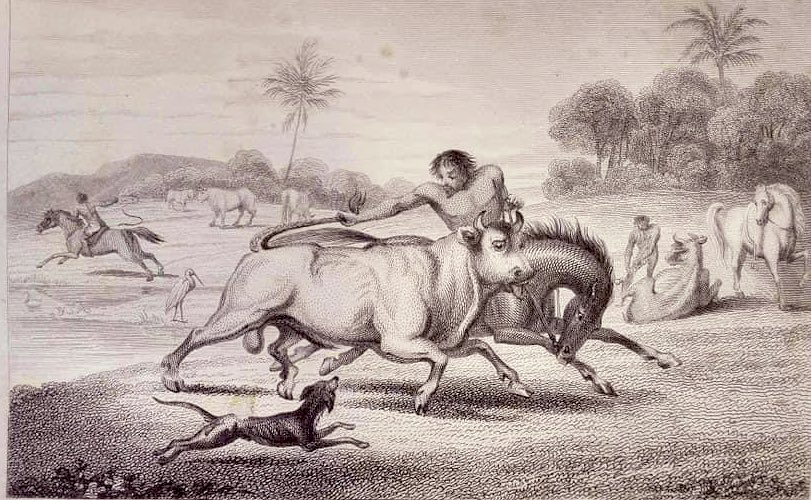 Coleo de Toros en el antiguo llano de (la gran) Colombia. 1827. Travels through the interior provinces of Columbia J. P. Hamilton, Londres 1827